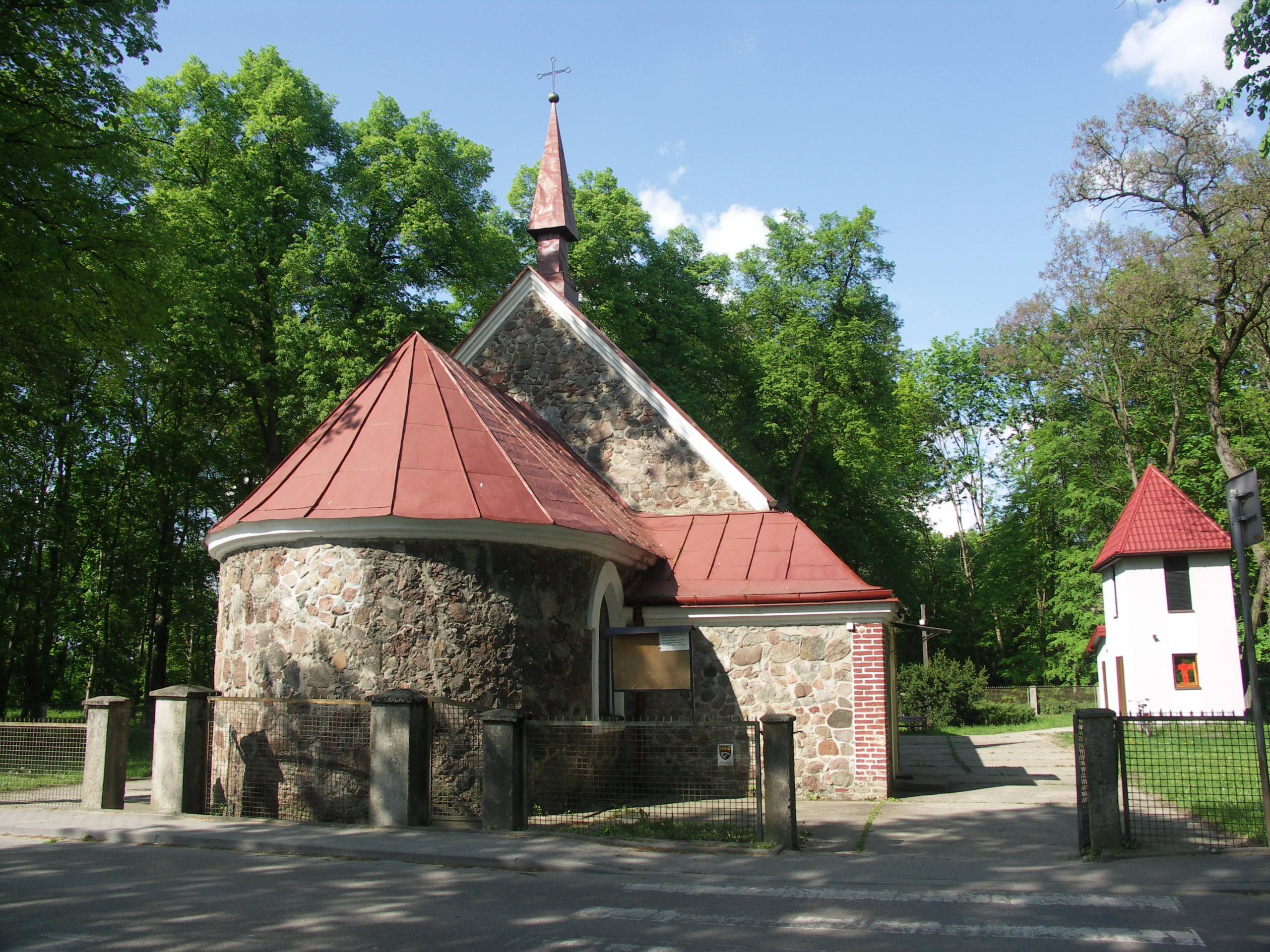 Kościół pod wezwaniem św. Antoniego.